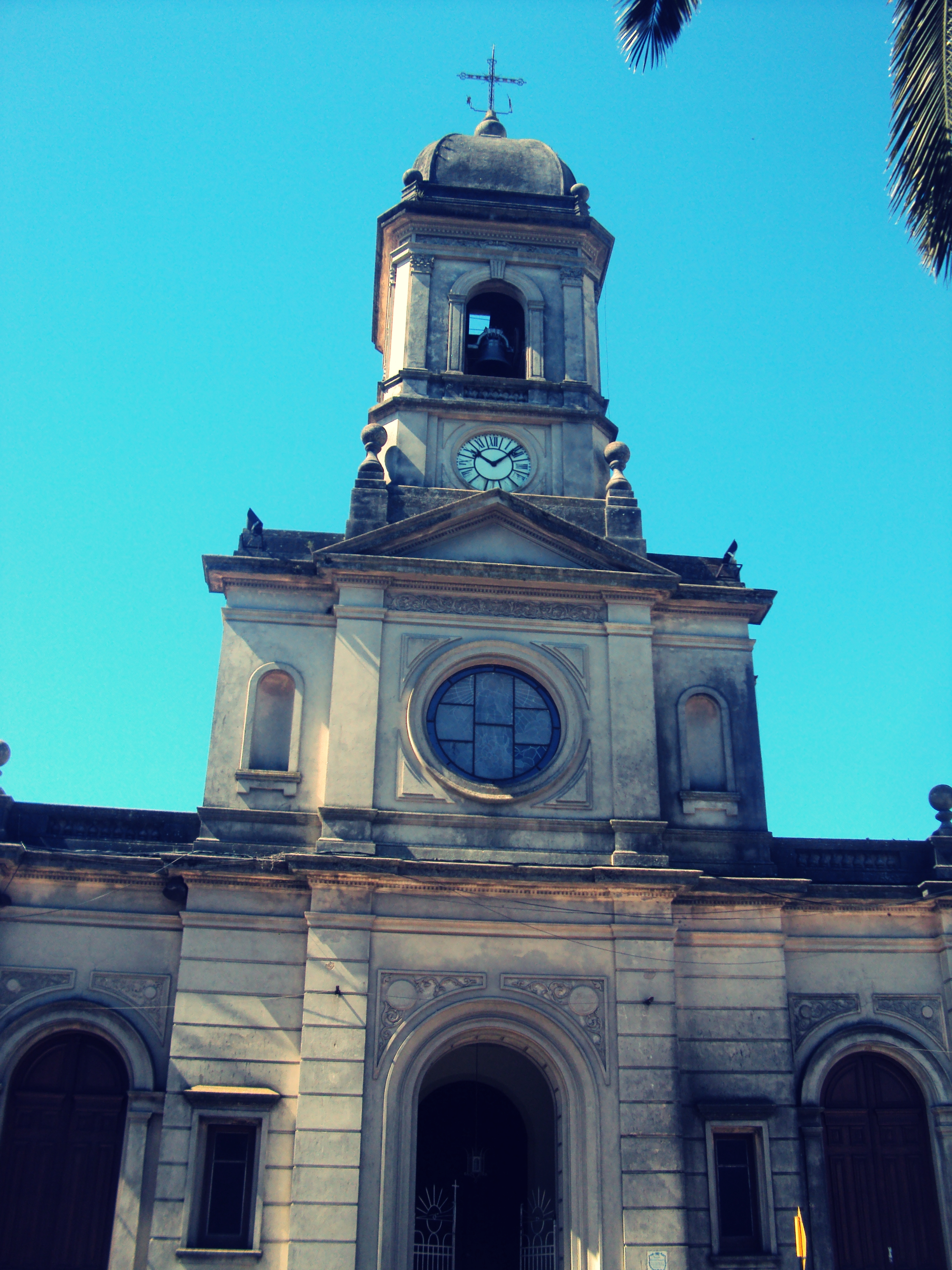 Templo de la Inmaculada Concepción. Ubicada en el departamento de Rivera